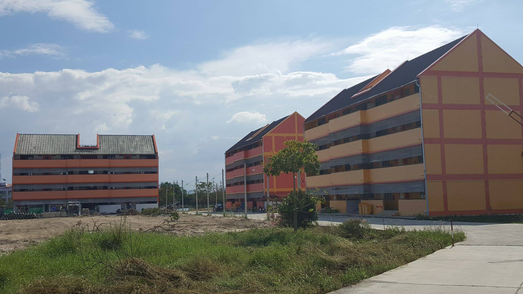 หอพักนักเรียน